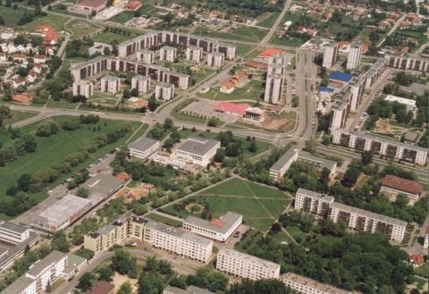 Kazincbarcika, Hungary, aerialphotography